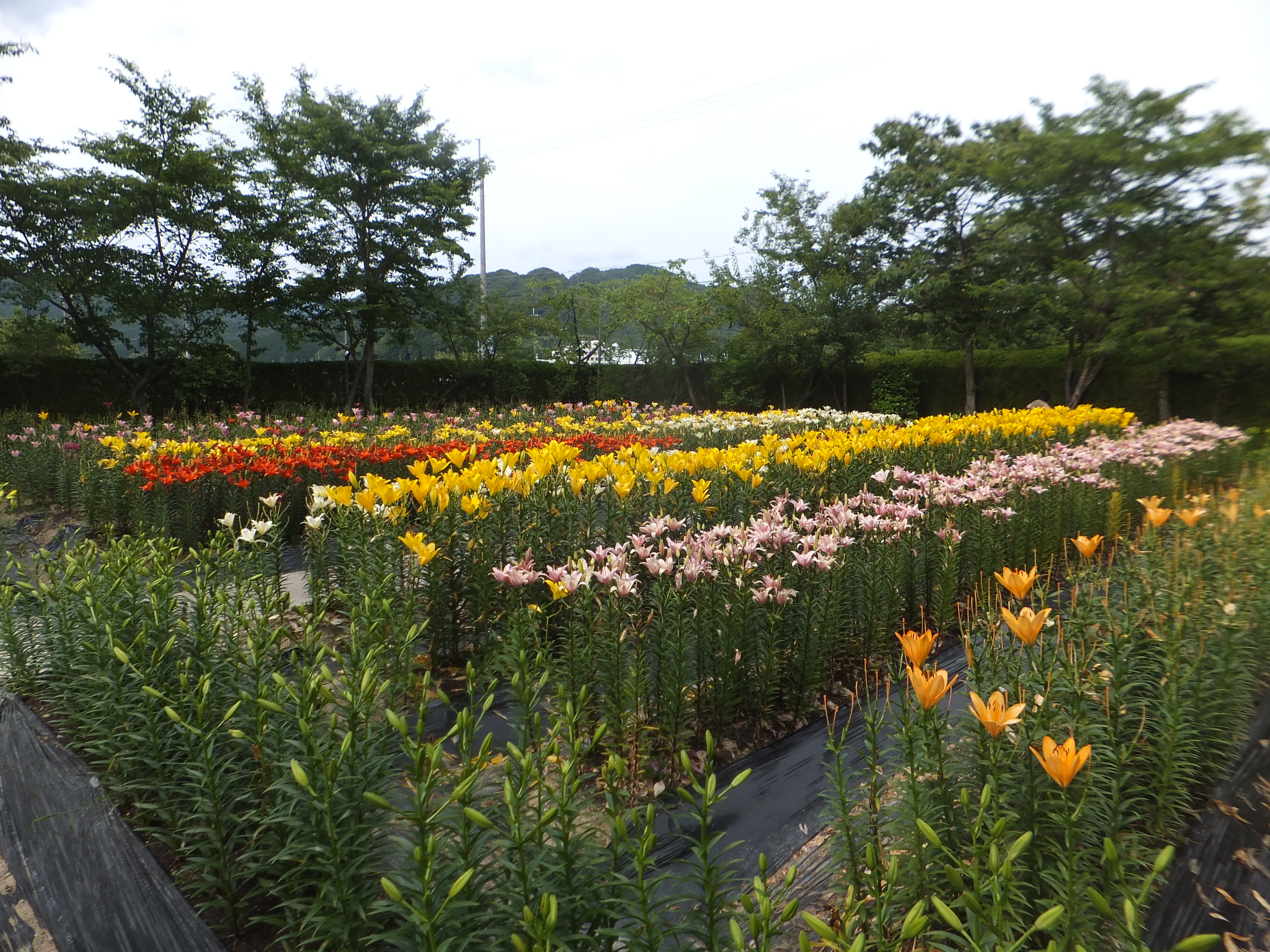 篠山玉水ゆり園